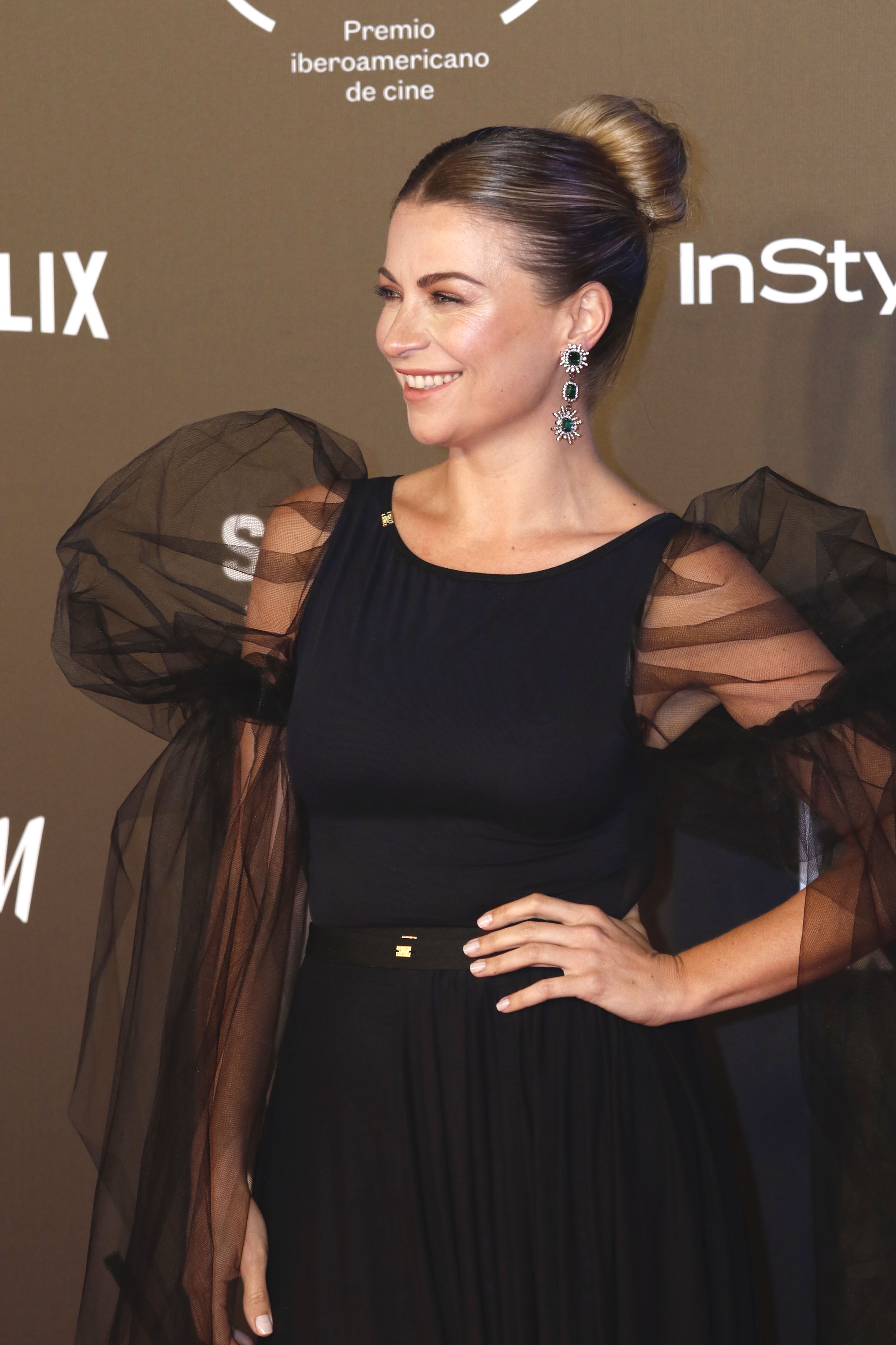 Miércoles 6 de diciembre de 2017. En el Teatro de la Ciudad Esperanza Iris, se realizó la 4ª Entrega del Premio Iberoamericano de Cine, Fénix; previo a la ceremonia, nominados, conductores, presentadores y elencos, desfilaron por la alfombra roja. Fotografía: Milton Martínez / Secretaría de Cultura CDMX.